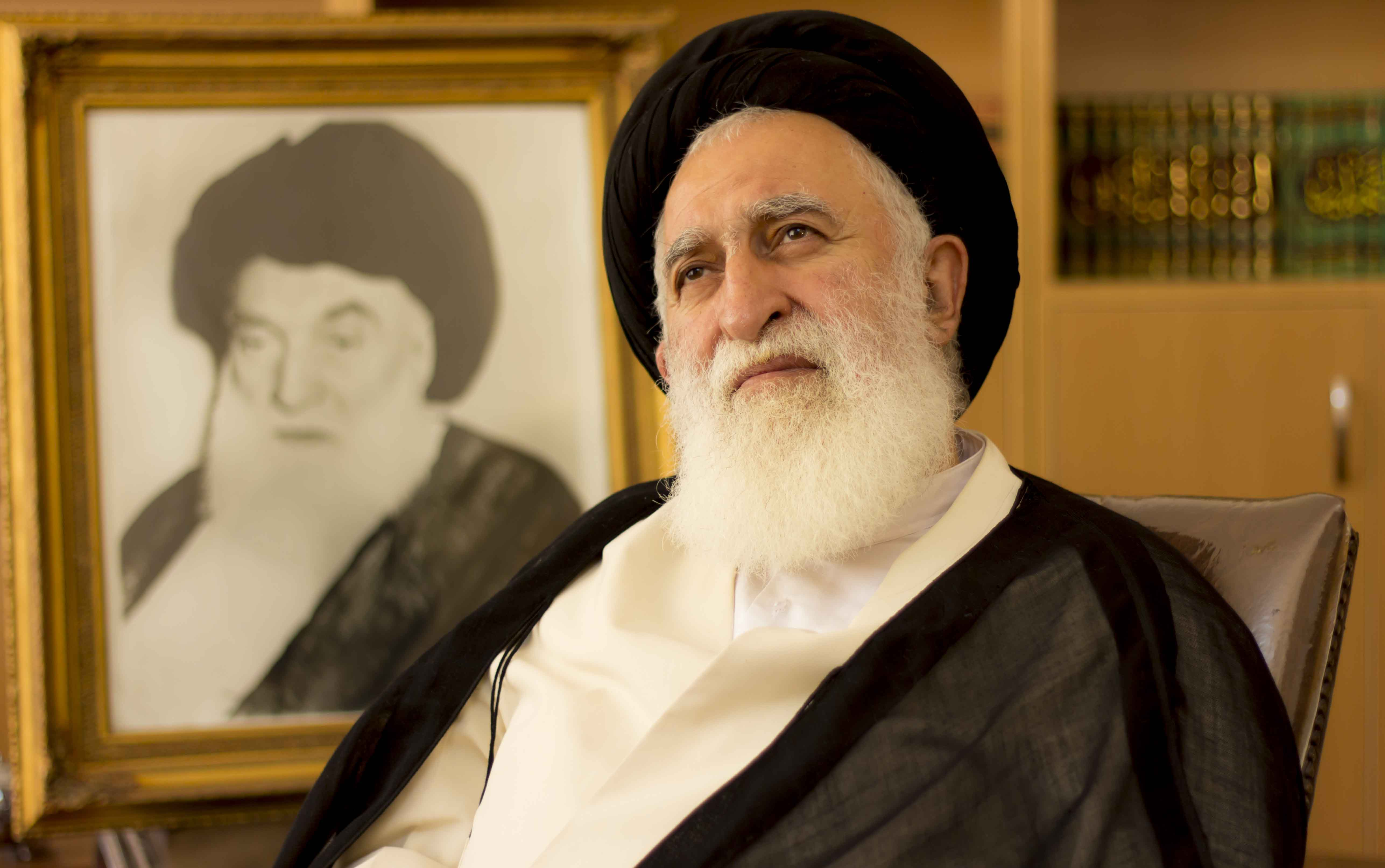 تصویر مربوط به مصاحبه ایشان با مجموعه فطرس مدیا در موضوع وحید بهبهانی است